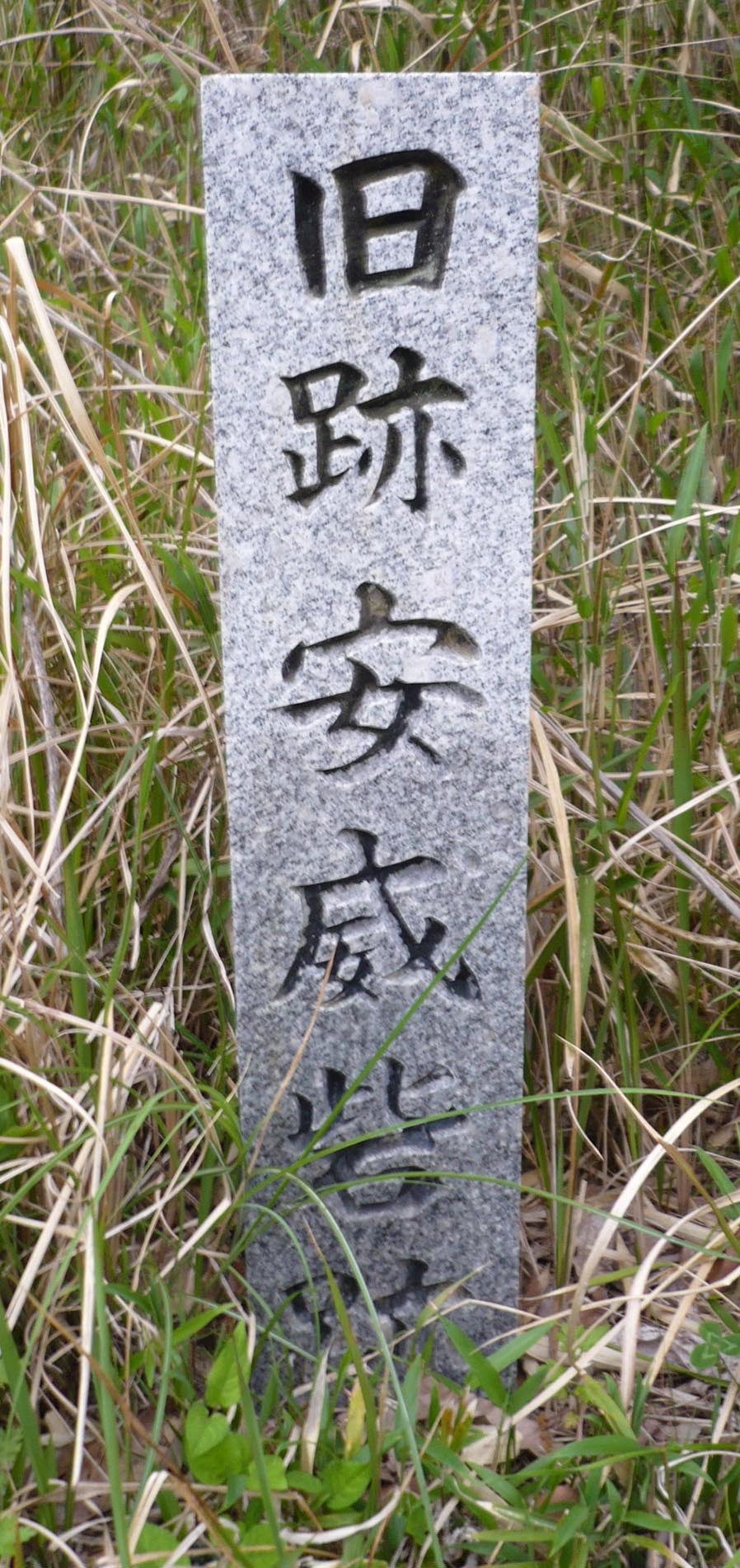 石碑